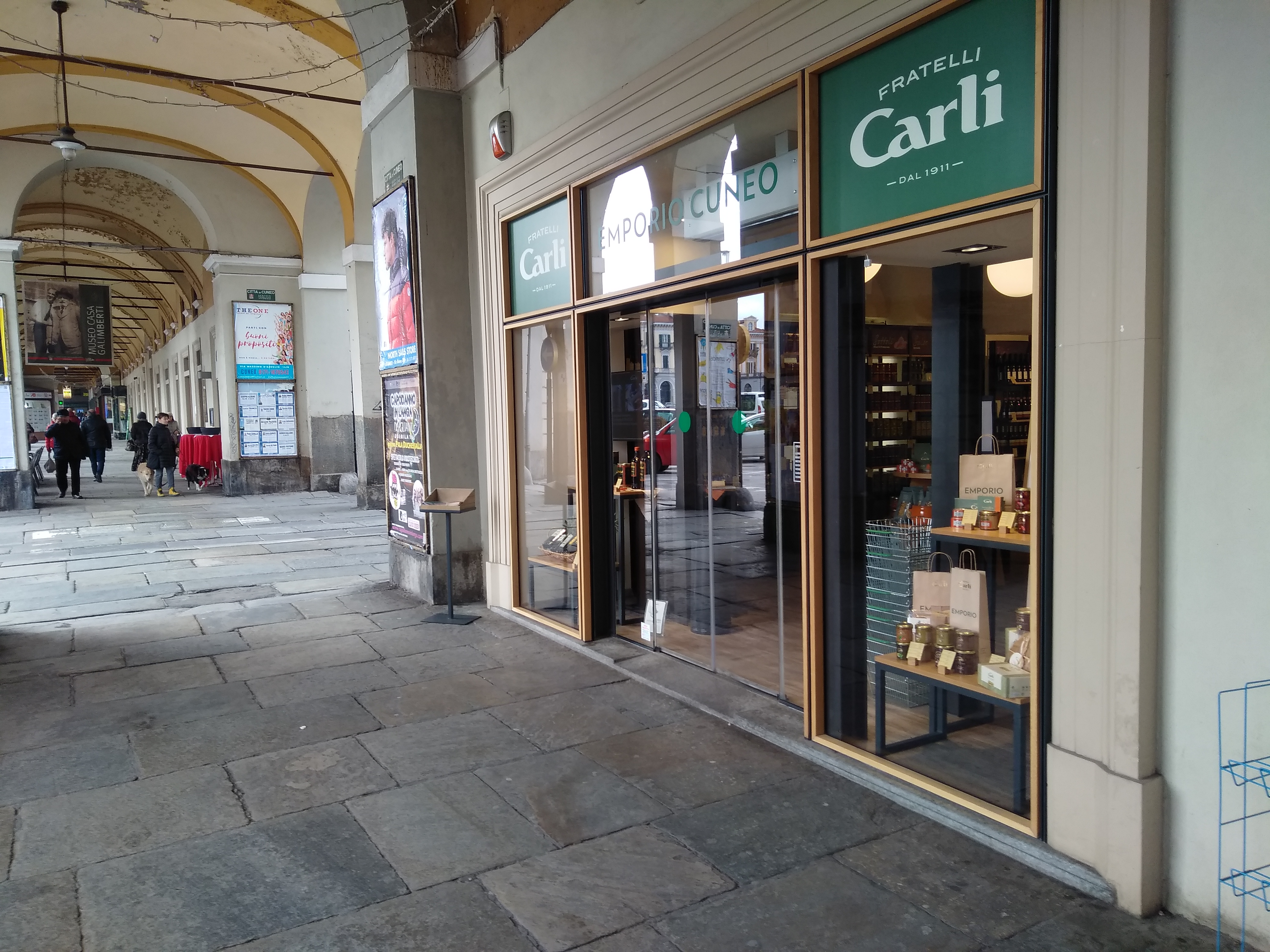 Punto vendita Olio Carli a Cuneo